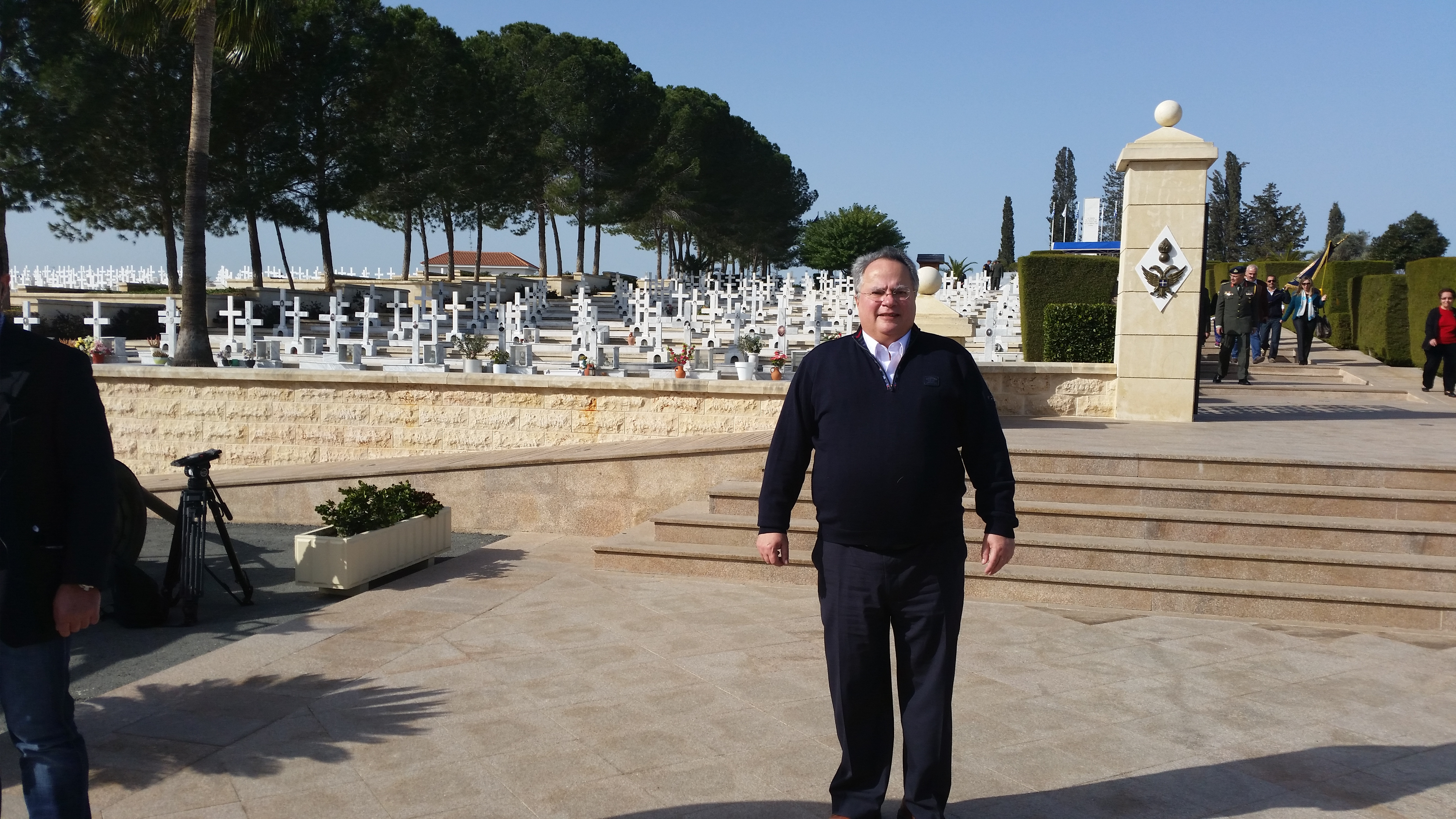 Κατάθεση στεφάνου από τον Πρωθυπουργό της Ελλάδας κ. Αλέξη Τσίπρα στον Τύμβο Μακεδονίτισσας, Λευκωσία 3 Φεβρουαρίου 2015